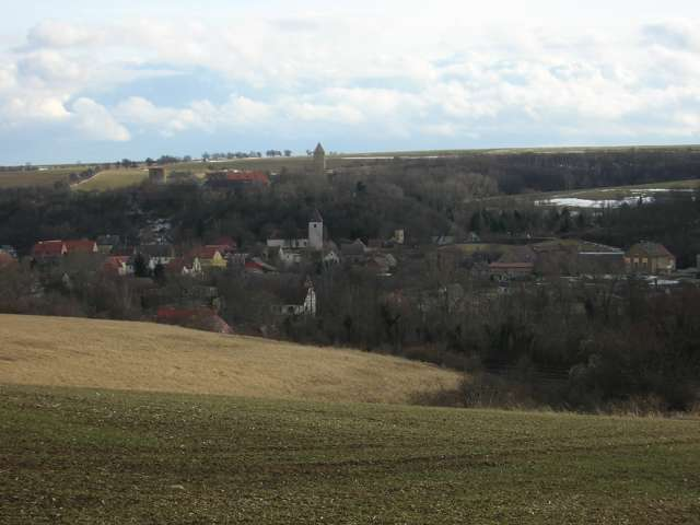 Blick auf Freckleben von der Nordseite her! Urheberrechte bei Private! (John-t-Clark)